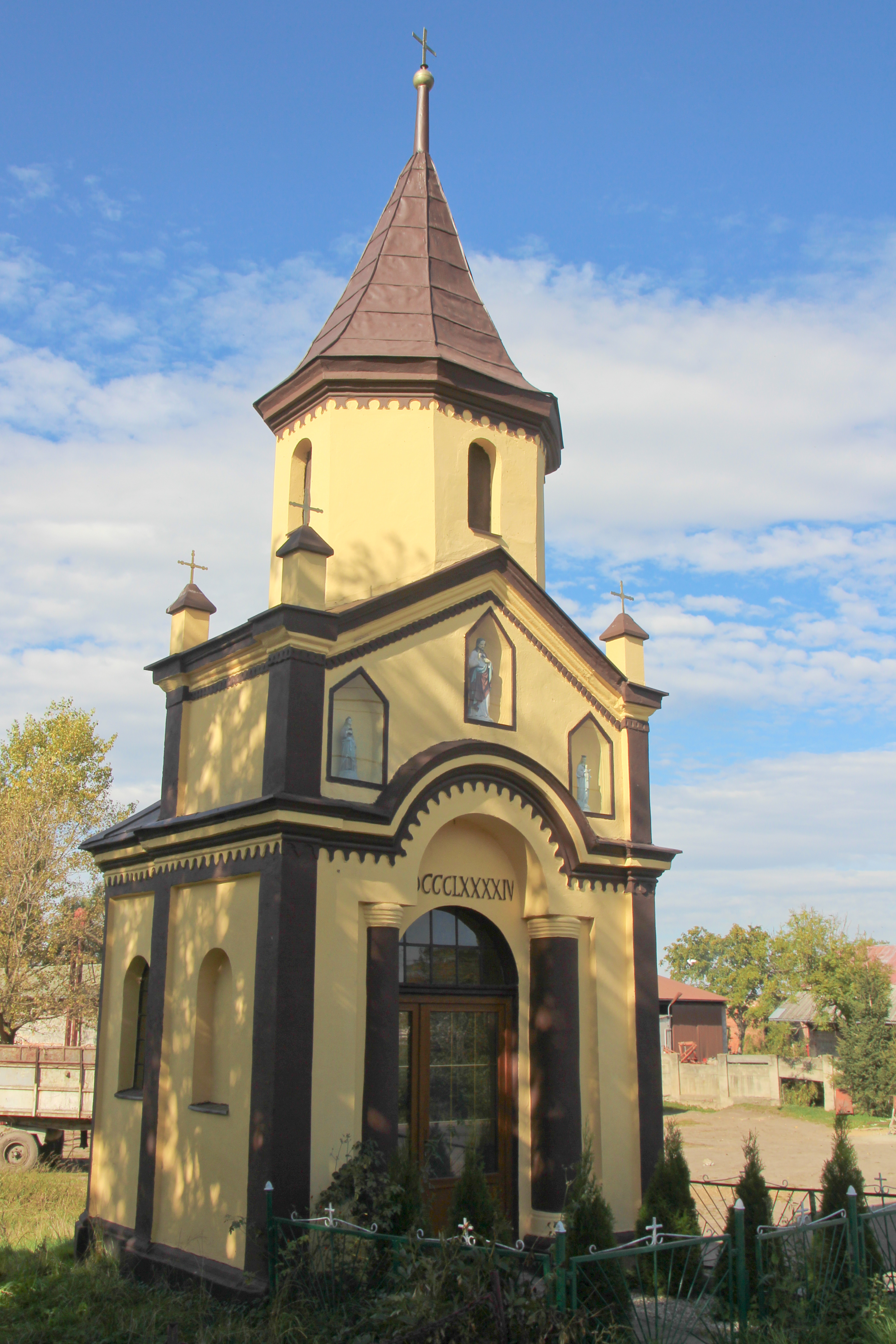 Kaplica w Witosławicach (dodatkowa nazwa w j. niem. Witoslawitz)- wieś w Polsce położona w województwie opolskim, w powiecie kędzierzyńsko-kozielskim, w gminie Polska Cerekiew.